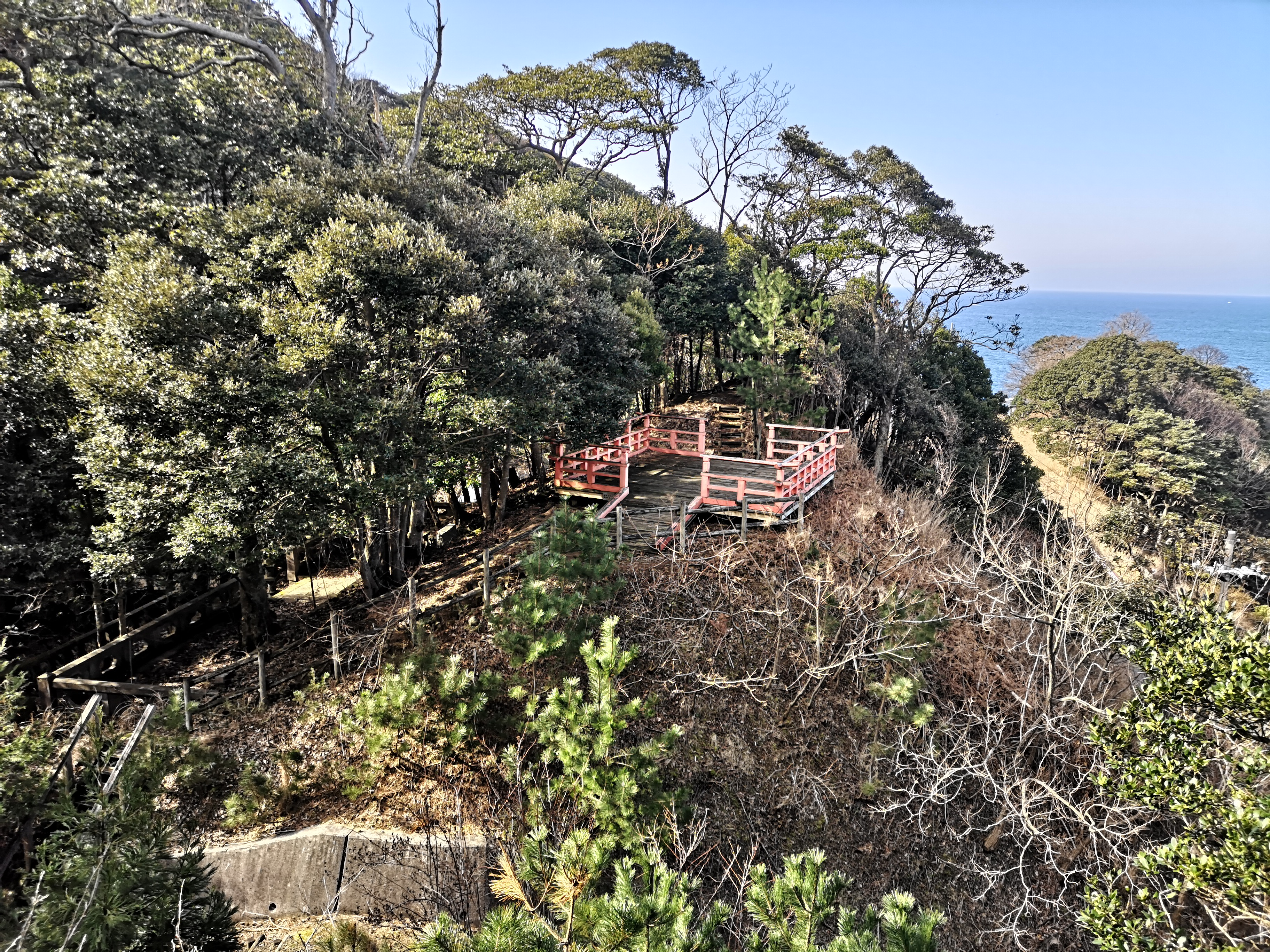 静神社境内 展望台